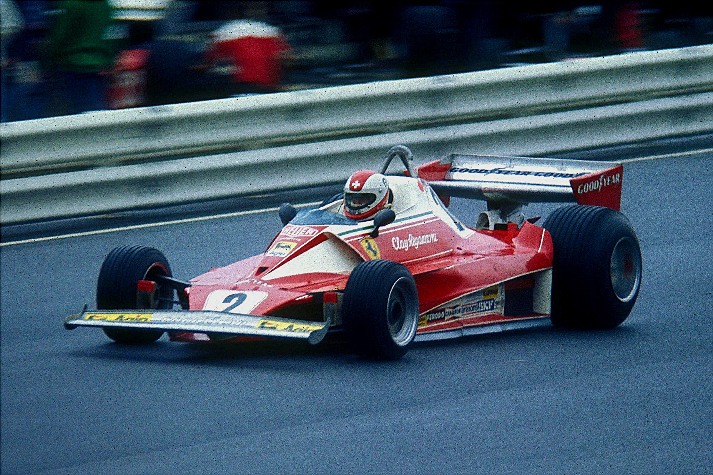 Clay Regazzoni im Ferrari 312T2 auf der Zielgeraden des Nürburgrings beim Training zum GP von Deutschland (Samstag, 31.07.1976)